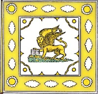 Bandiera della squadra del San Marco (Gioco del Ponte di Pisa)